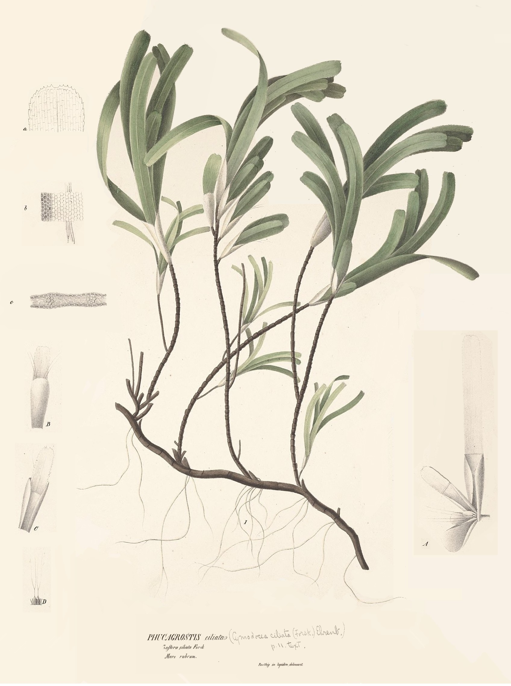 Thalassondendron ciliatum